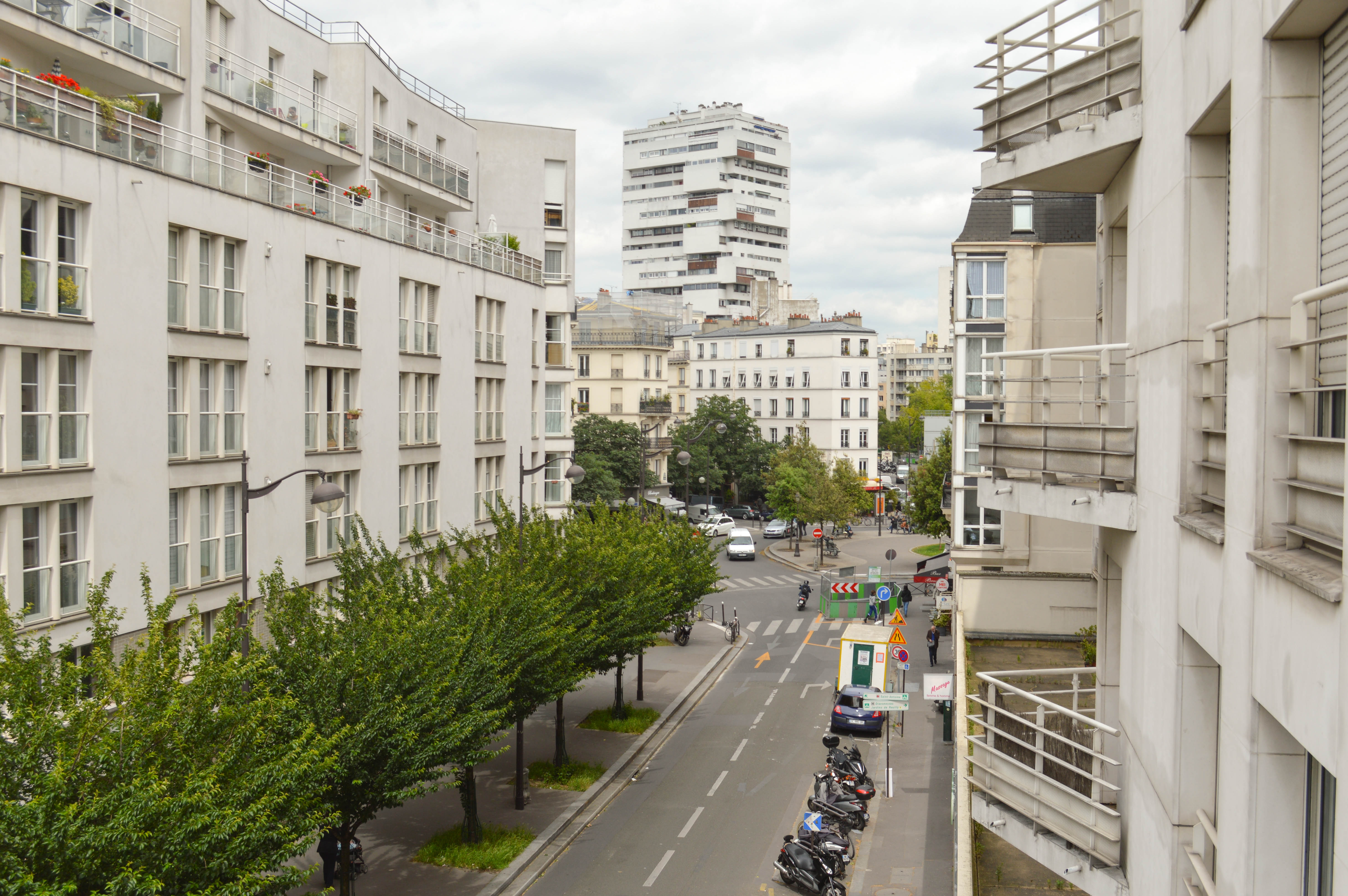 Rue de Rambouillet as seen from the Promenade plantée, Paris.